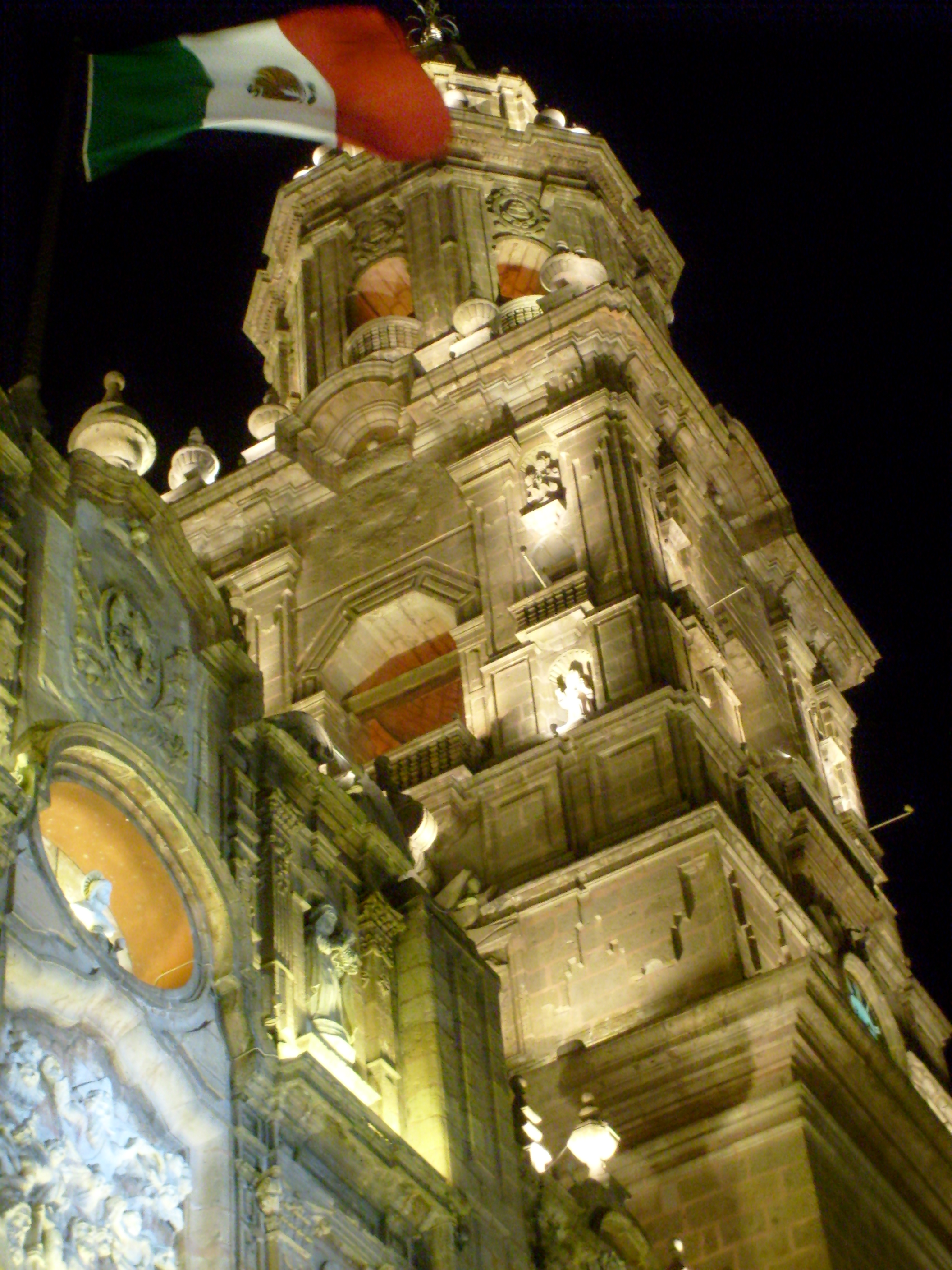 asi se ve la catedral desde la parte inferior